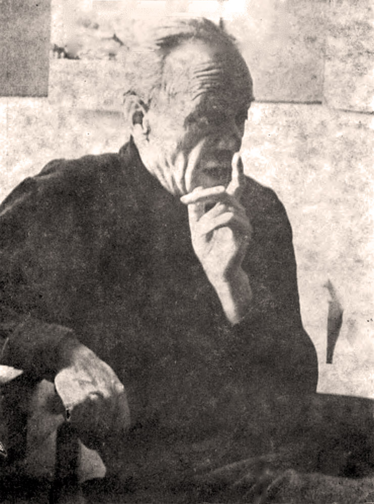 Włodzimierz Zonn (1905-1975), fotografia skanowana z Uranii, nr 12, grudzień 1983